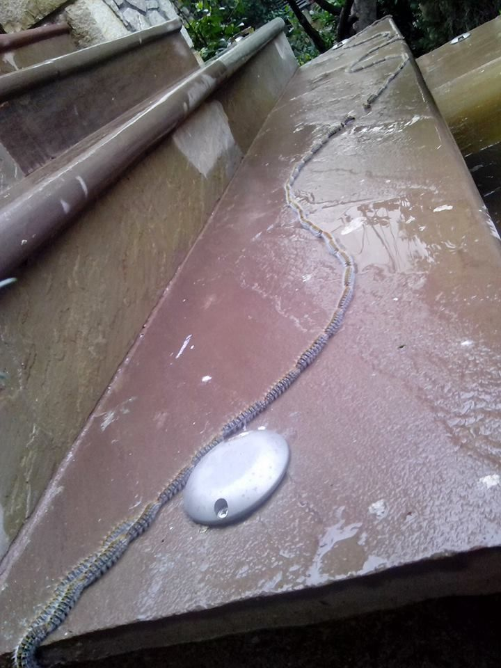 Zdjęcie z Grecji